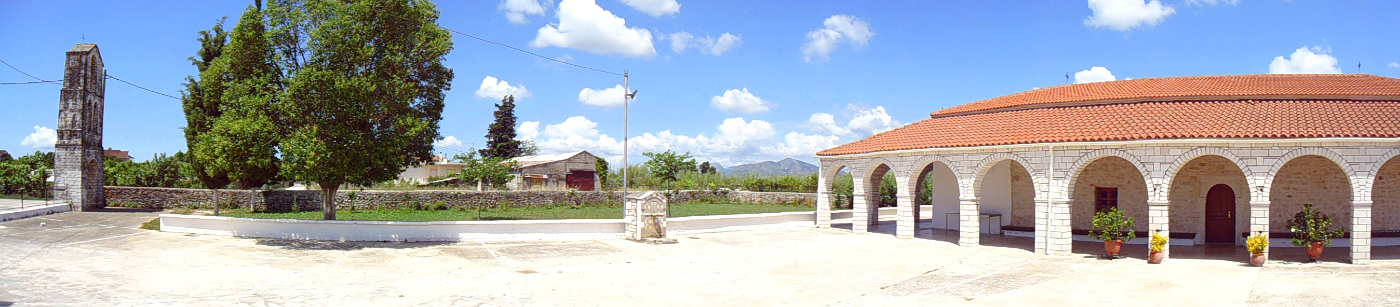 Πανοραμική άποψη